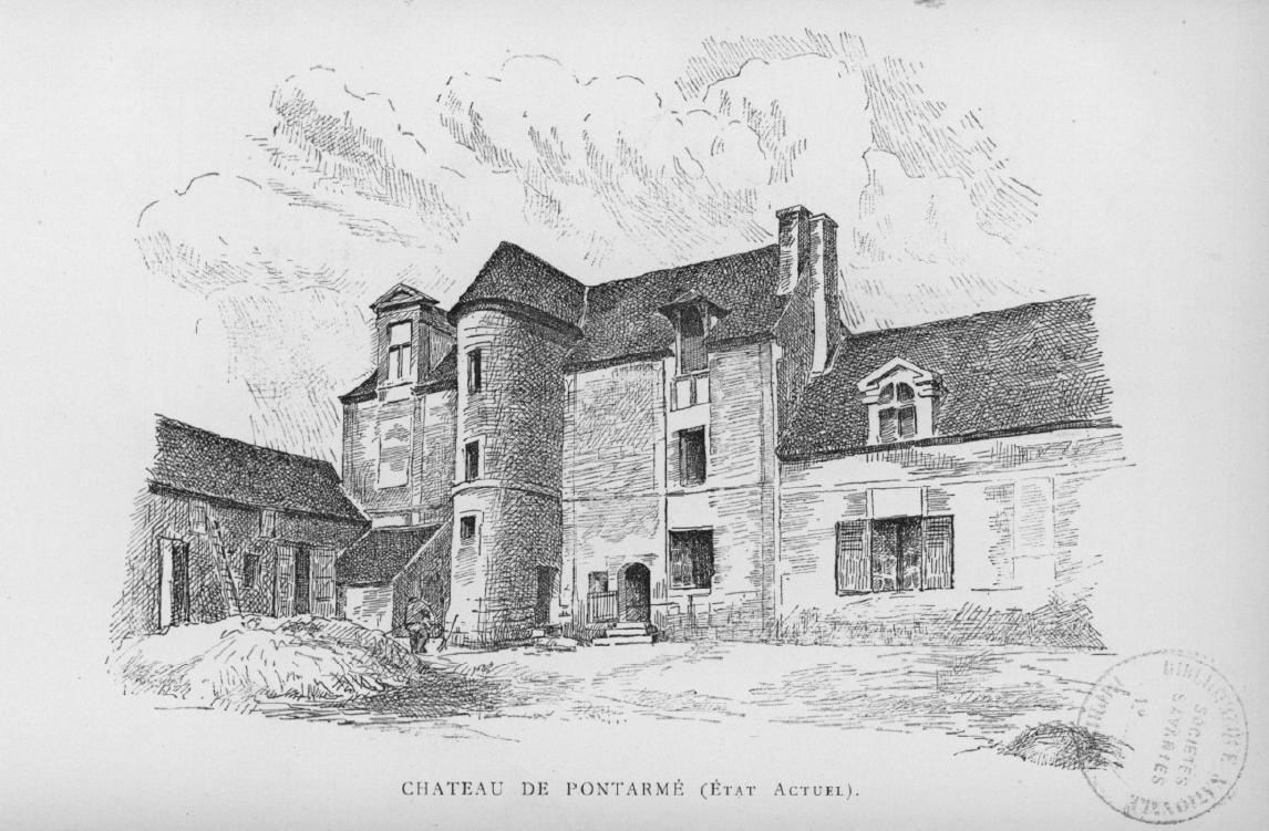 Dessin de la façade sur la cour du logis du château dans son état vers 1894. Le château sert de ferme. La grande lucarne à droite de la tourelle d'escalier n'existe pas. Hormis sur la grande lucarne de gauche, aucune fenêtre à meneau Renaissance n'est visible. La partie du logis ne comportant pas d'étage n'est pas encore précédée par la galerie actuelle.